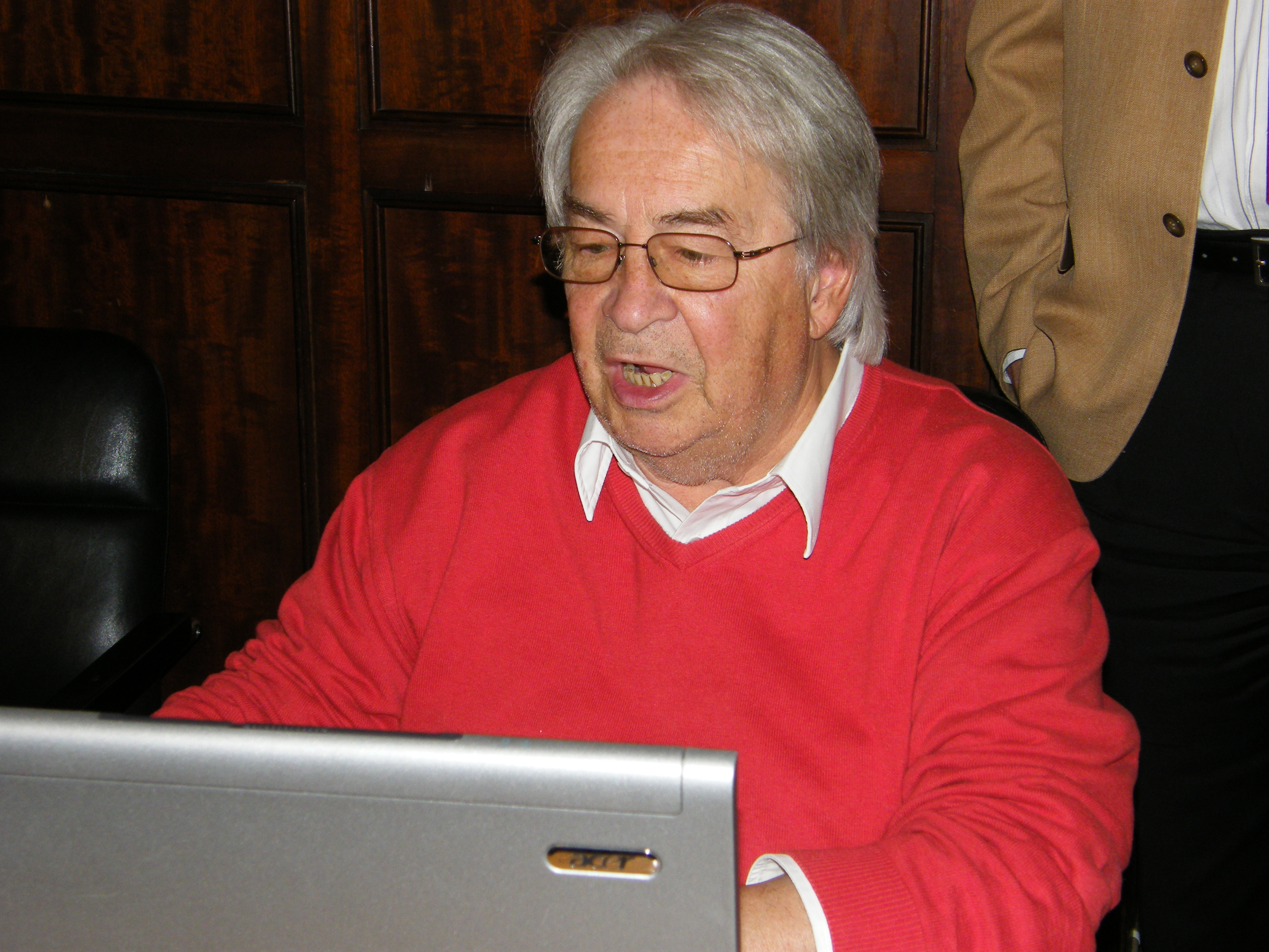 Christian Zickelbein bei der 3. Runde der Schach-Bundesliga 2008/09 im Rathaus Schöneberg in Berlin